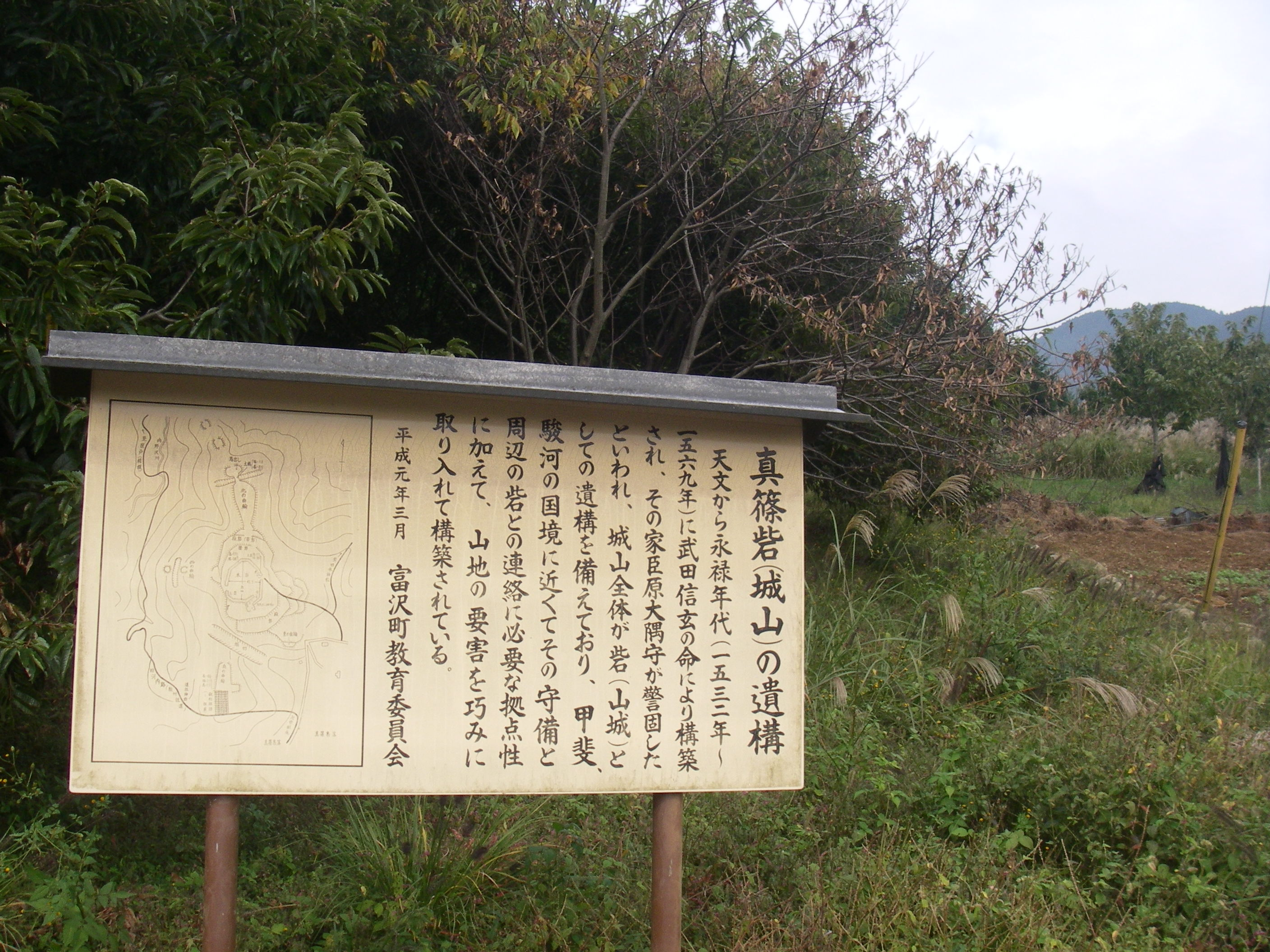 真篠砦